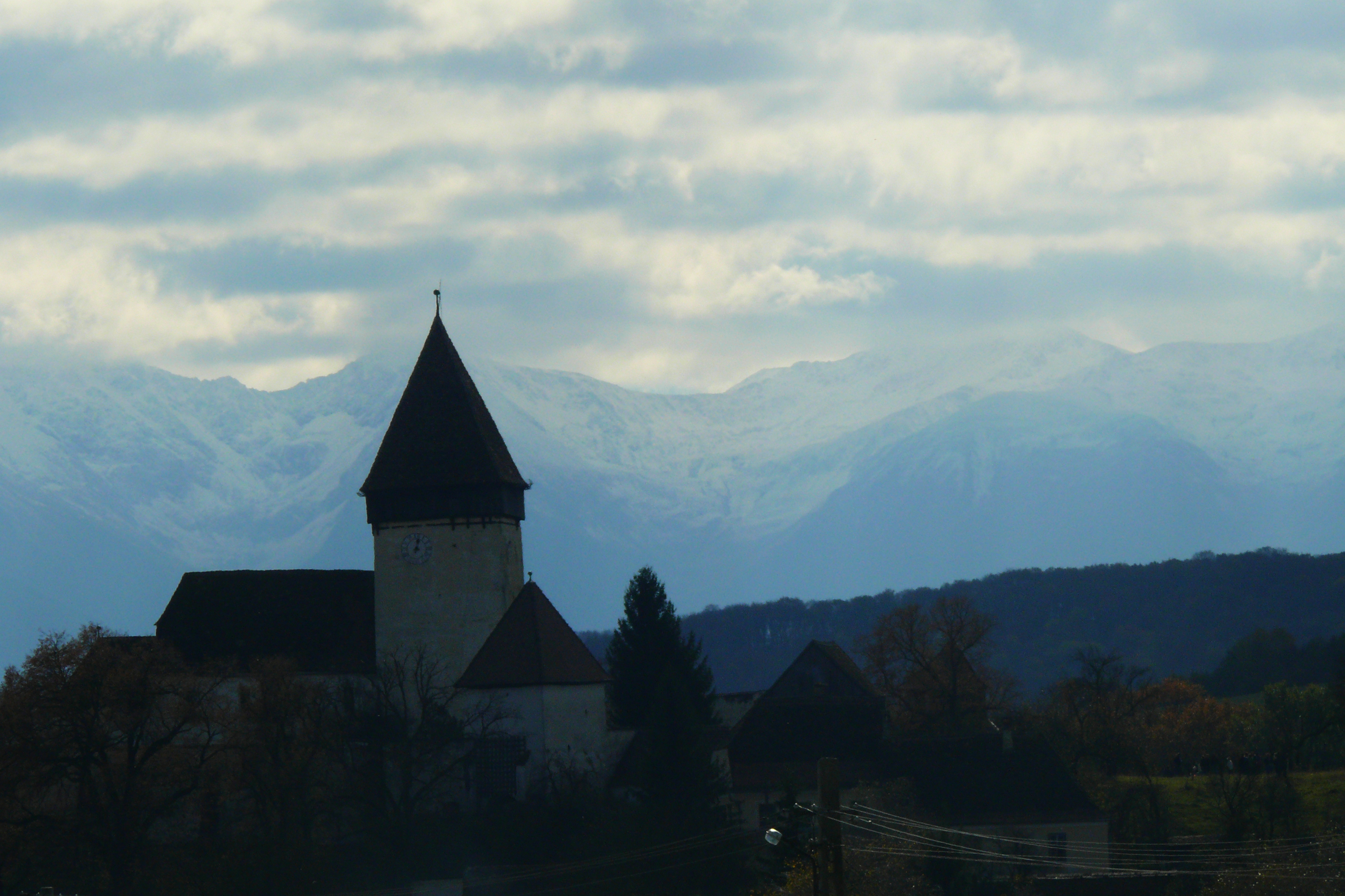 Monumentul face parte din complexul sud transilvanean al bisericilor fortificate construite de comunitatea saseasca, complex unic in lume si protejat de UNESCO 01